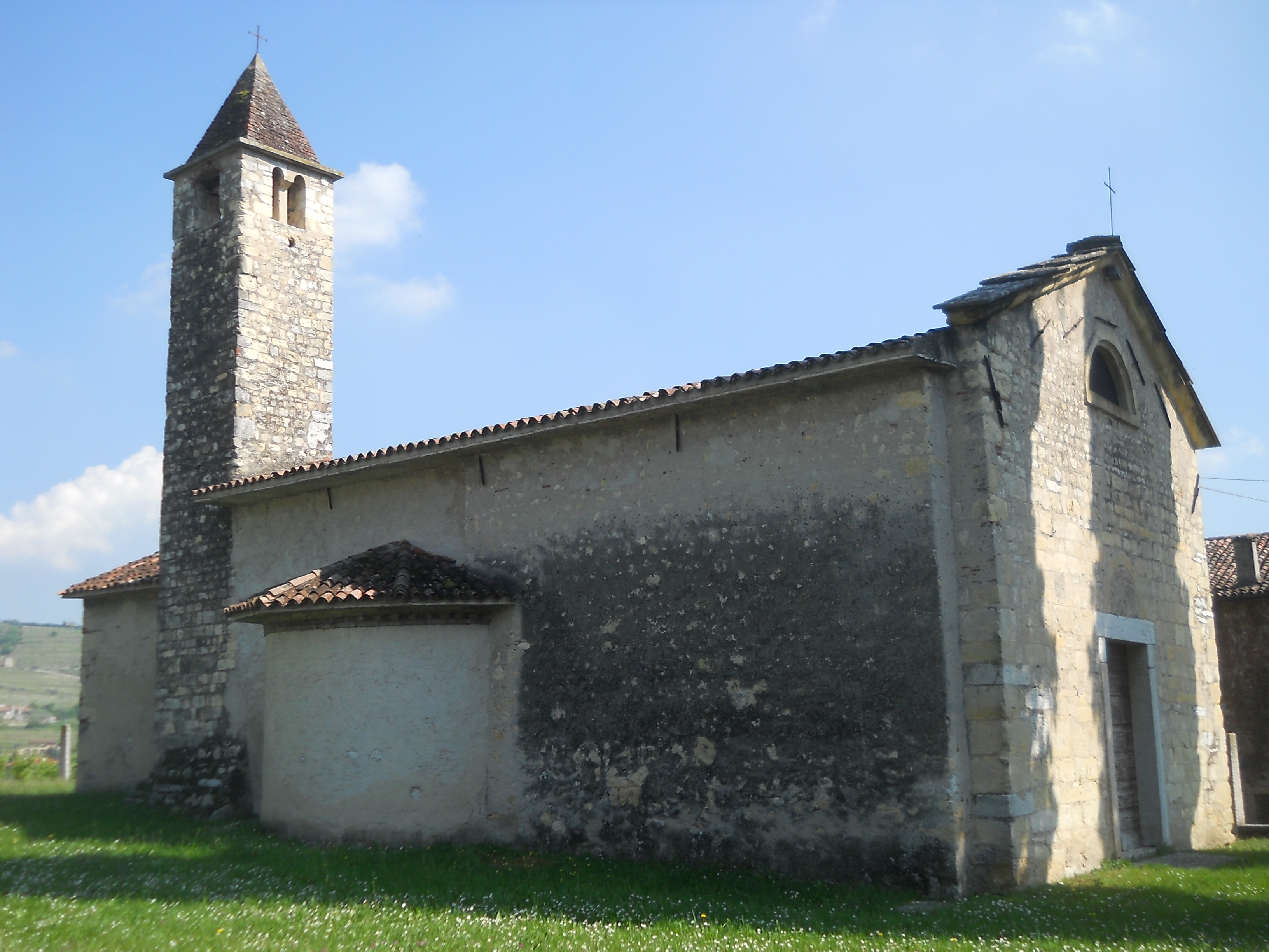 Chiesa romanica di San Marco al Pozzo a Valgatara (frazione di Marano di Valpolicella)